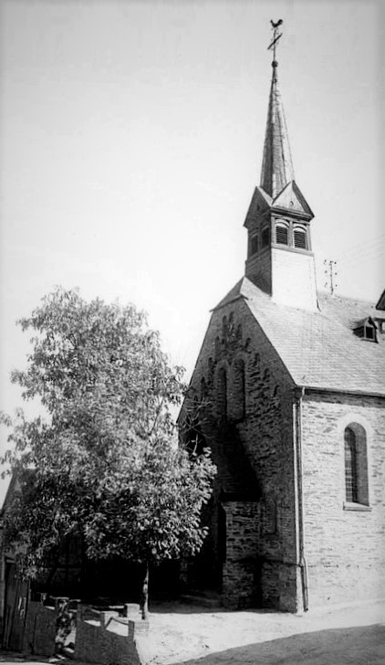 Historisches Foto der St. Antonius Kirche in Wollmerschied Fotograf unbekannt